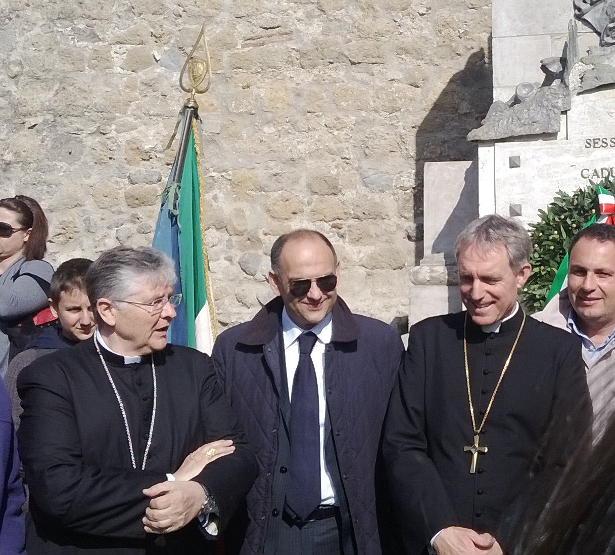 Incontro tra il vescovo Orazio Francesco Piazza e padre Georg Gänswein, Sessa Aurunca (2014)